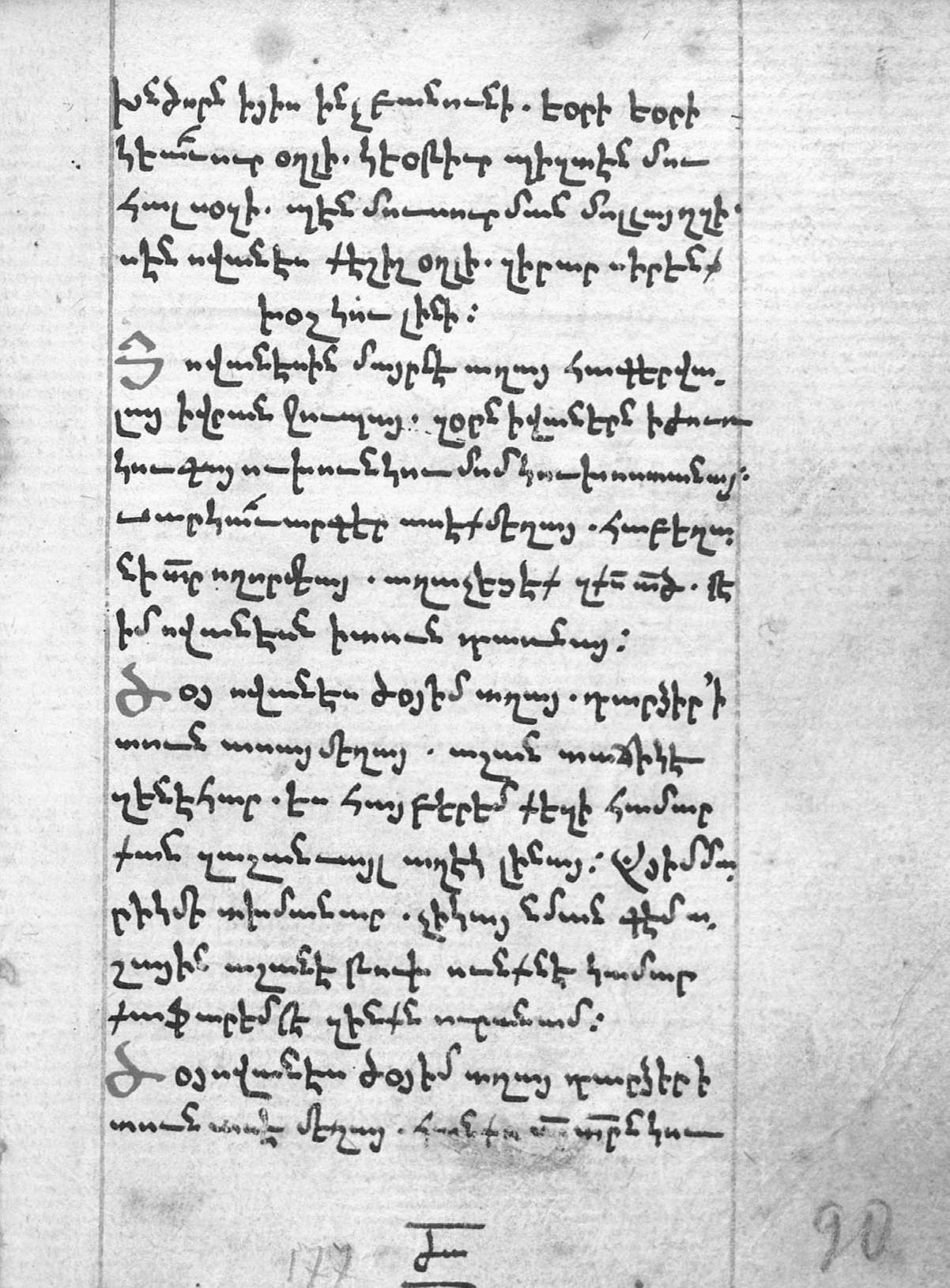 Մատենադարան, ձեռ. 9271, 90ա